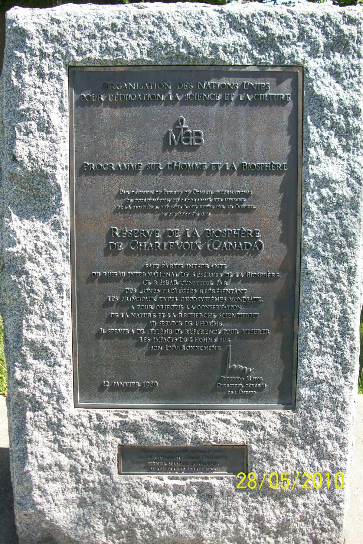 Plaque de bronze montée sur monument de pierre reproduisant le certificat officiel soulignant la création de la Réserve mondiale de la Biosphère de Charlevoix. Cette plaque fut dévoilé, près du Centre d’Art de Baie-Saint-Paul, par le premier ministre du Canada, Brian Mulroney.